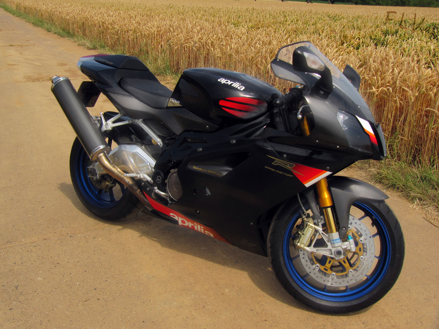 Aprilia RSV 1000 R Factory in der limitierten Edwards und Haga Edition